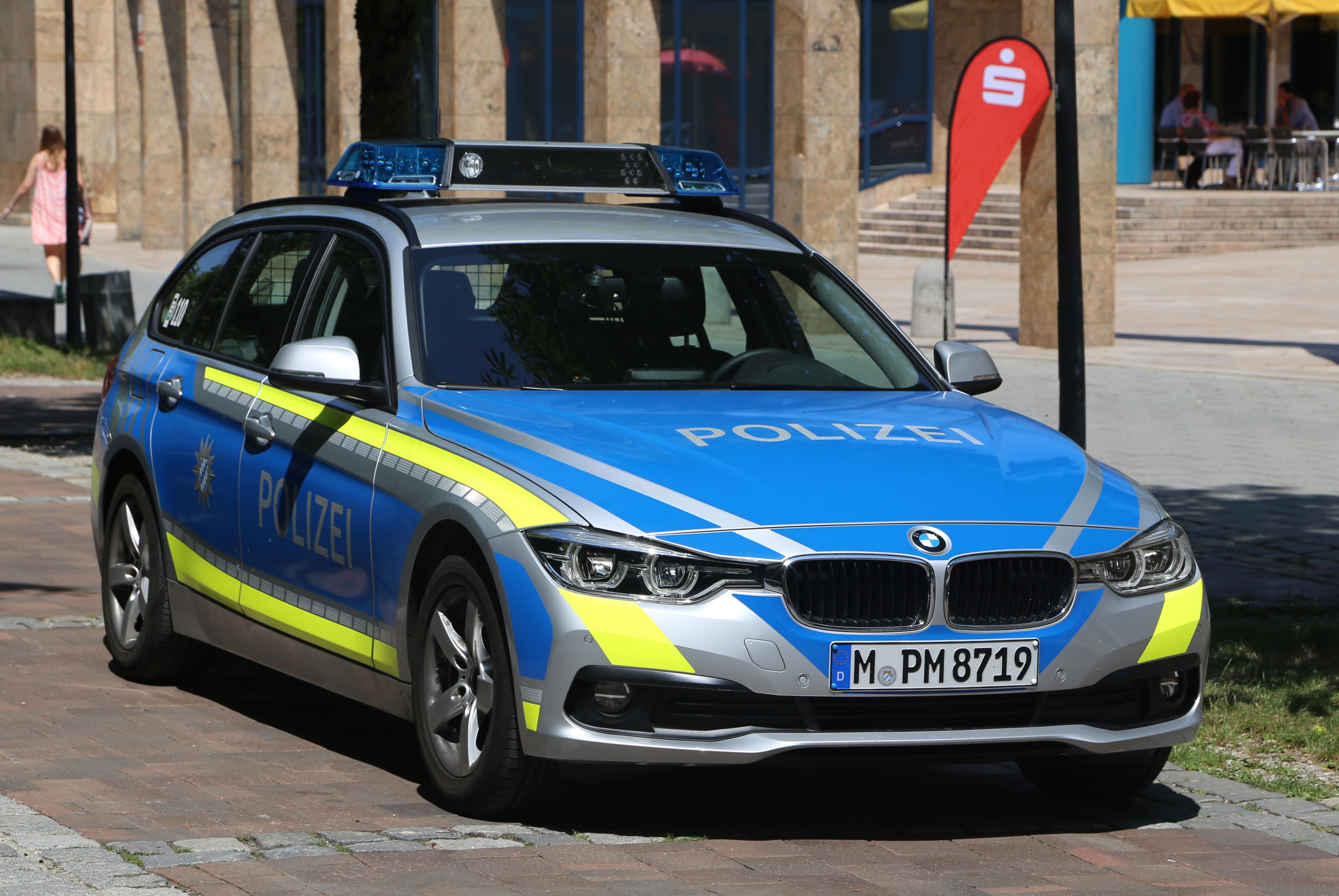 Polizeifahrzeug in München-Schwabing